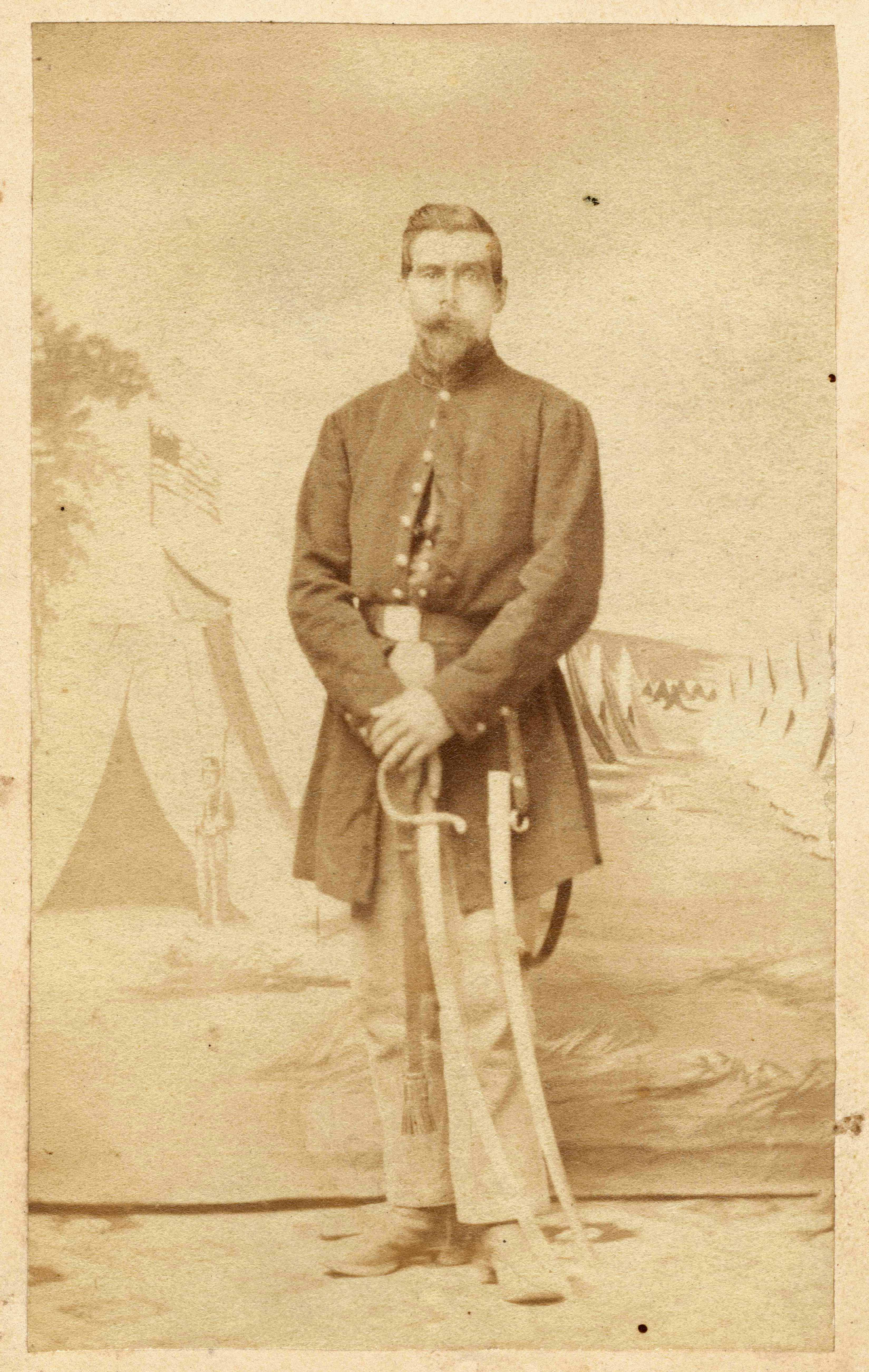 Der württembergische Auswanderer Johann Jakob Beck in Uniform, 1864 (HStAS J 300 Nr. 663)